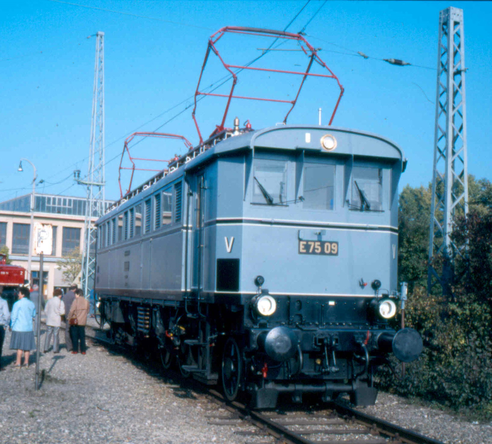 Elektrolokomotive E 75 09 der Deutschen Reichsbahn im DB-Ausbesserungswerk Freimann